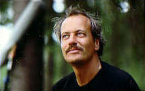 Göran Carmback